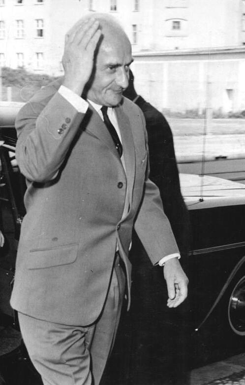 Zentralbild Spremberg Kn-Ri. 26.8.1964 Verhandlungen über Weiterführung der Passierscheinübereinkommen fortgesetzt Der Vertreter der Regierung der DDR, Staatssekretär Erich Wendt und der Vertreter des Senats von Westberlin, Senatsrat Horst Korber trafen in Begleitung von Experten am 26. August 1964 zu weiteren Verhandlungen über eine Weiterführung der Passierscheinübereinkunft vom 17. Dezember 1963 zusammen. Die Verhandlungen fanden im Haus der Ministerien, Berlin, Leipziger Strasse statt.